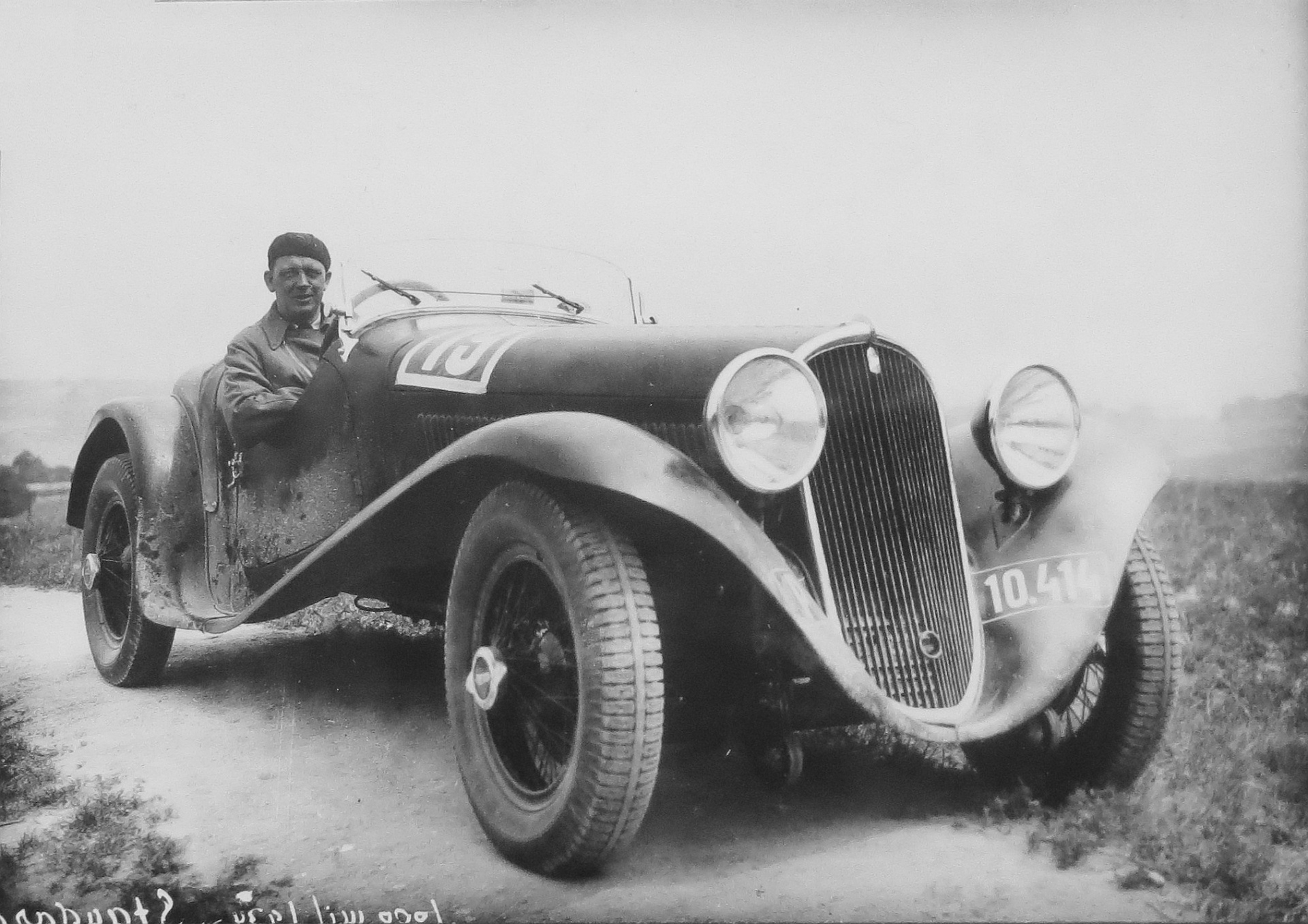 Walter Standard S, vítěz1000 mil čsl. Jindřich Knapp (1934)